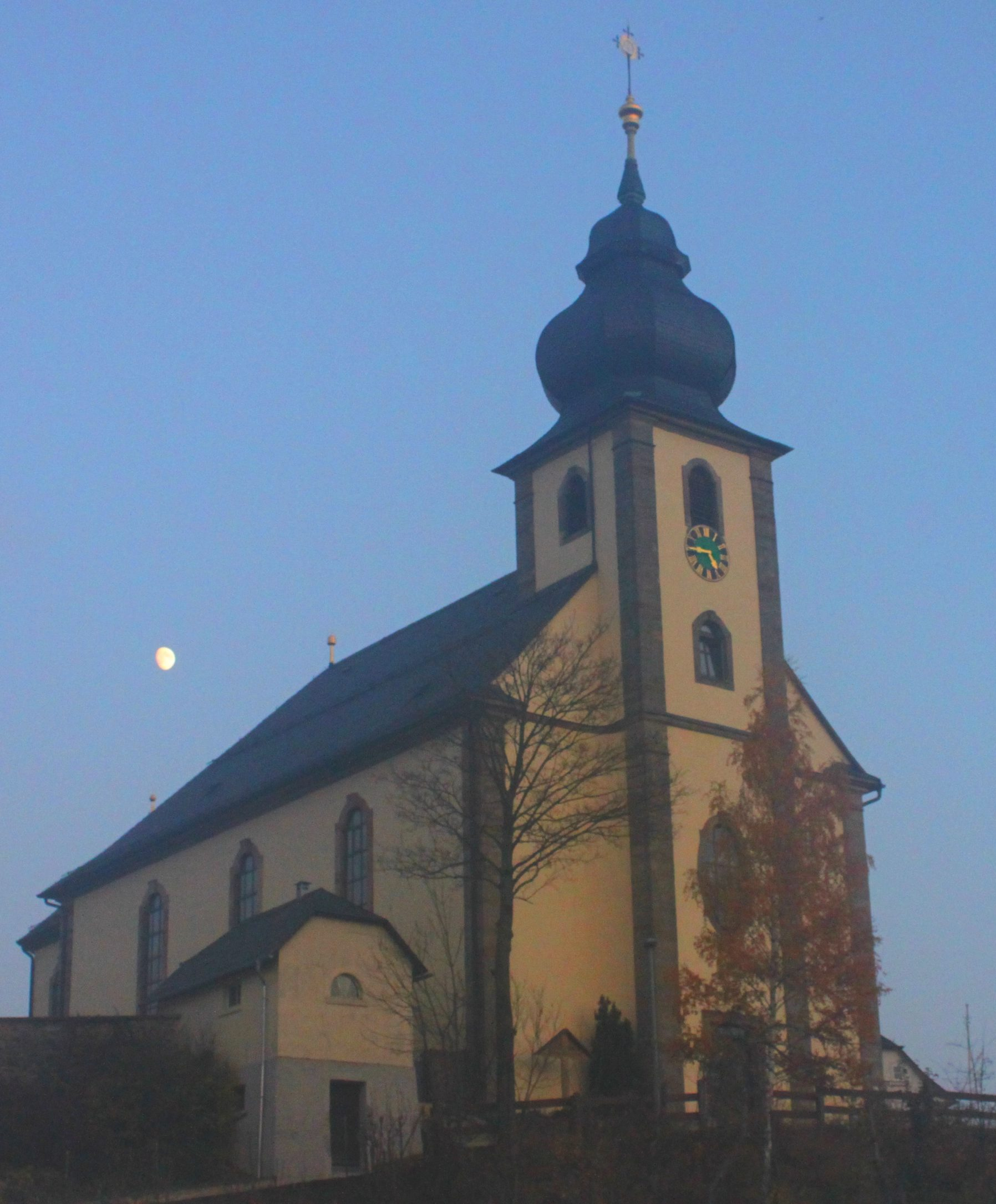 Die Filialkirche St. Bartholomäus, St. Antoniusweg 29, Marktleugast bei Mondschein.